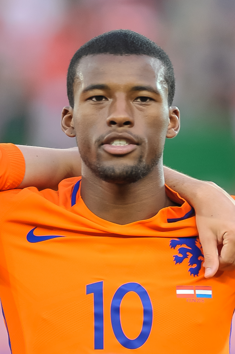 Wien, 4.6.2016, ÖFB Laenderspiel - Österreich vs Niederlande. Bild zeigt Georginio Wijnaldum (NED).